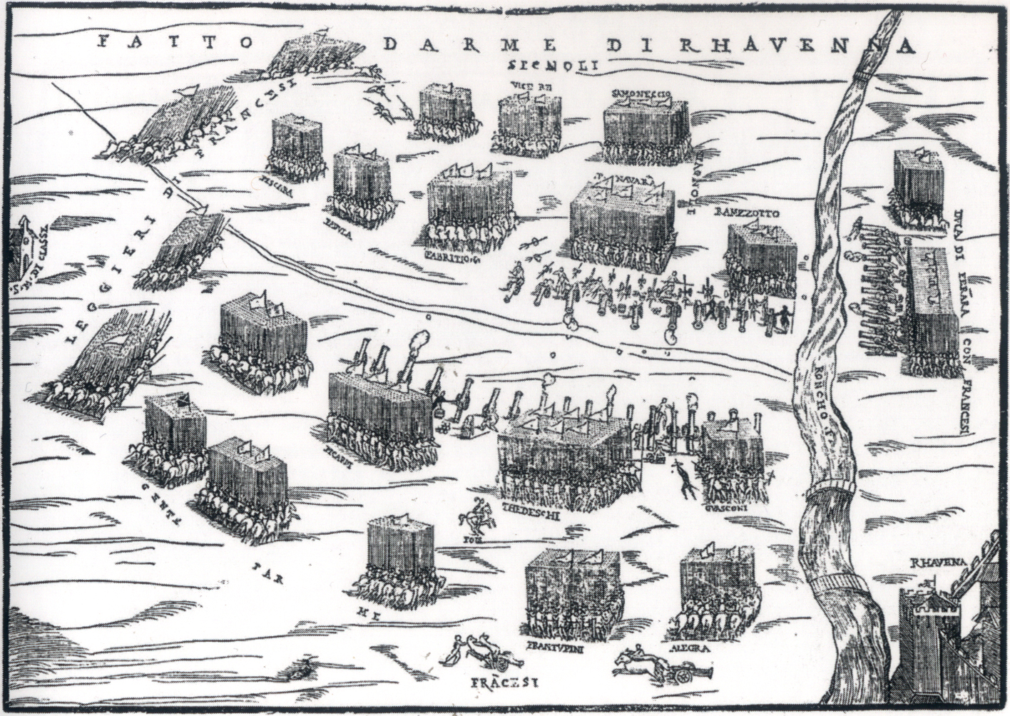 Xilografia. 1559